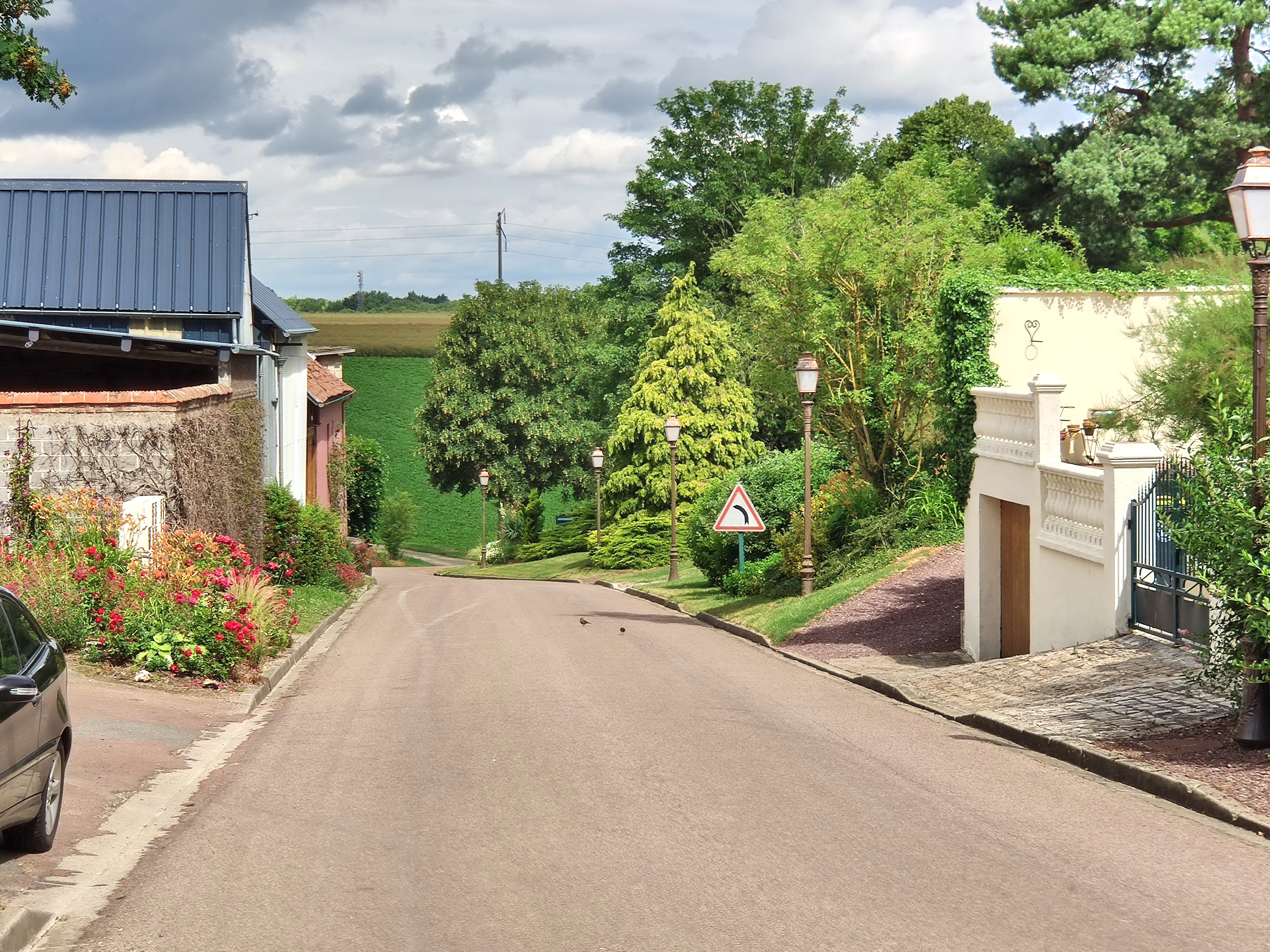 Seux - Rue de la Croix